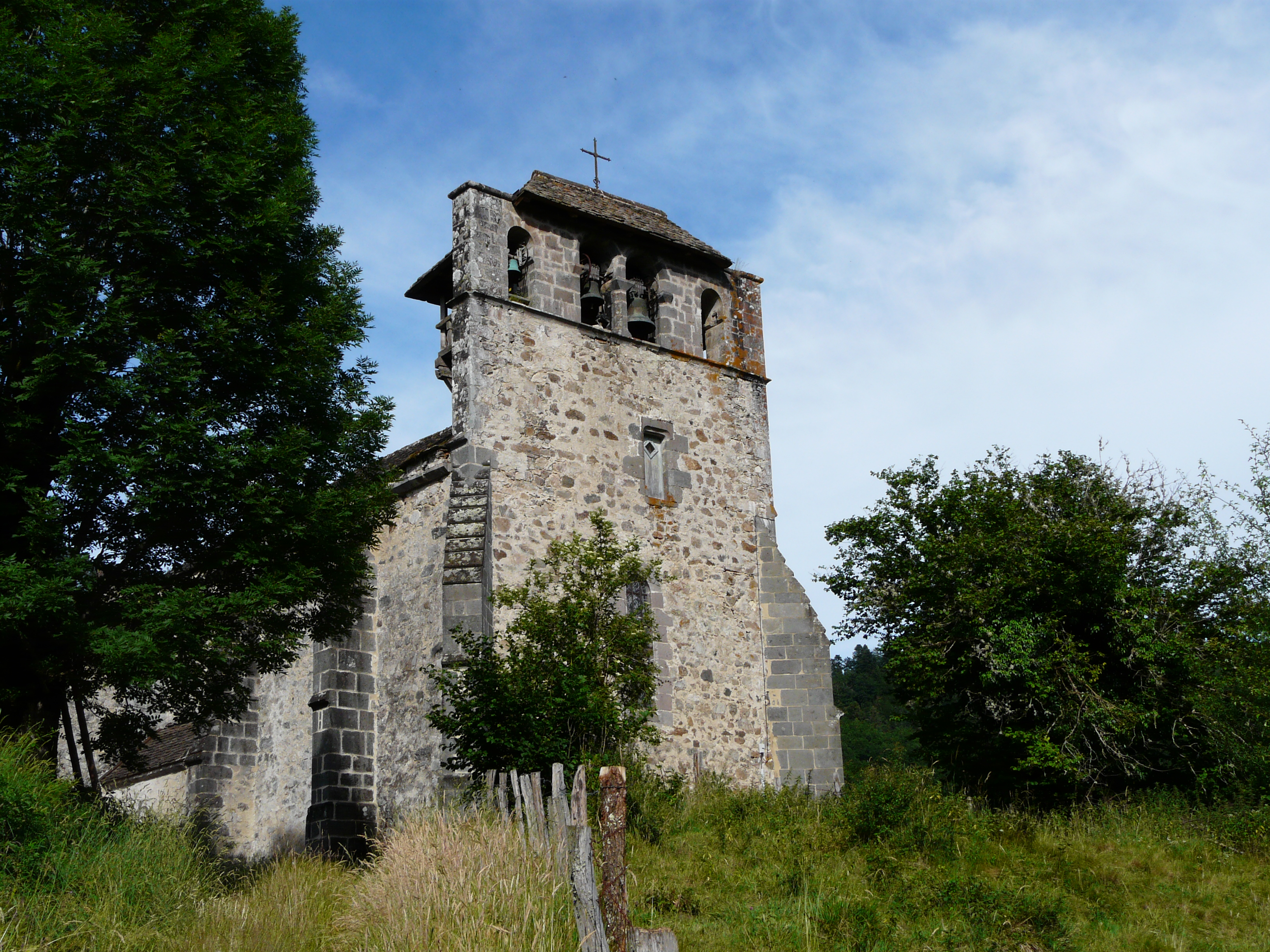 L'église Saint-Martin, Trémouille, Cantal, France.